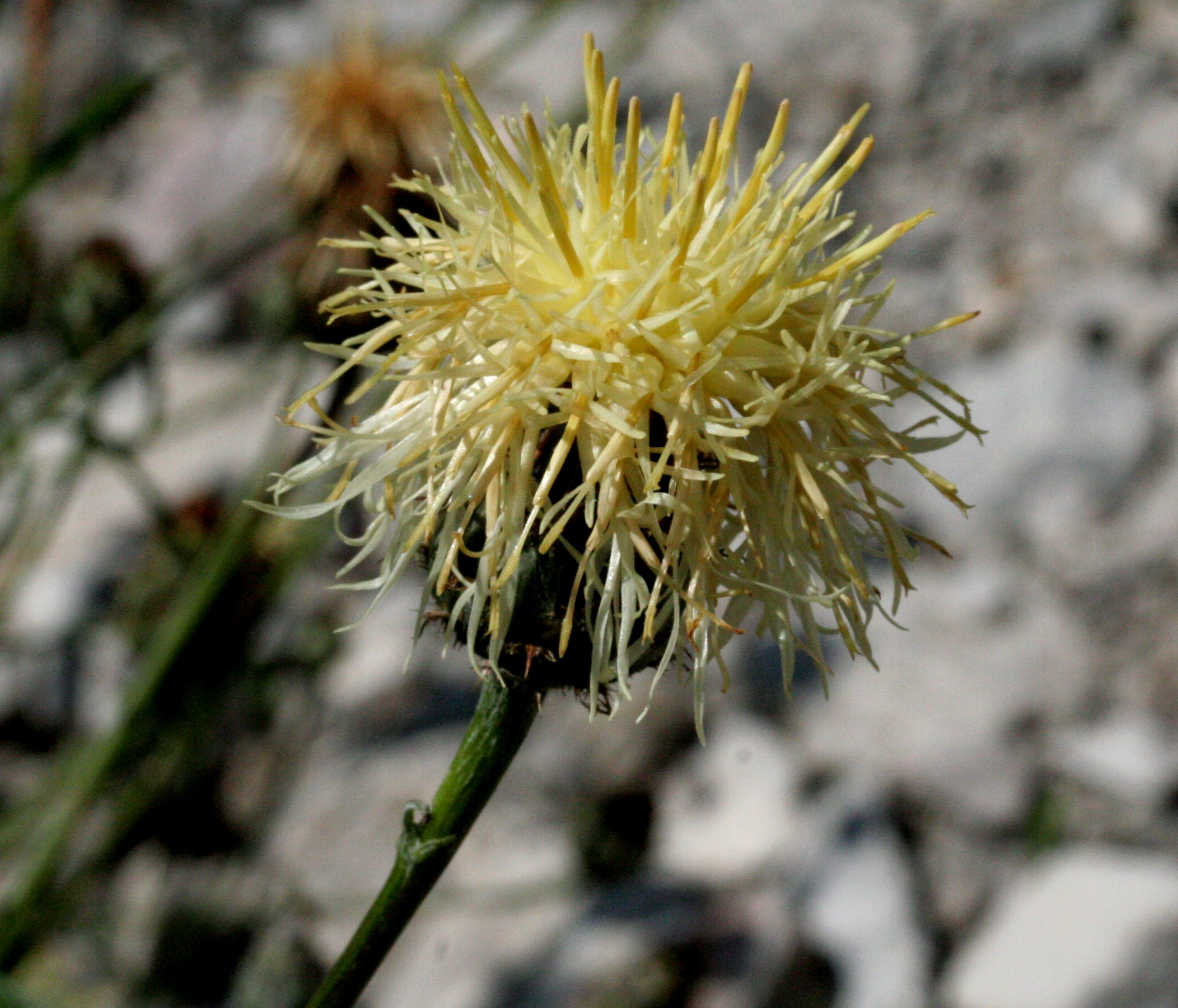 Fiordaliso giallo-roseo - Località: Giardino Botanico Alpino "Giangio Lorenzoni", Pian Cansiglio, Tambre d'Alpago (BL), 1000 m s.l.m.